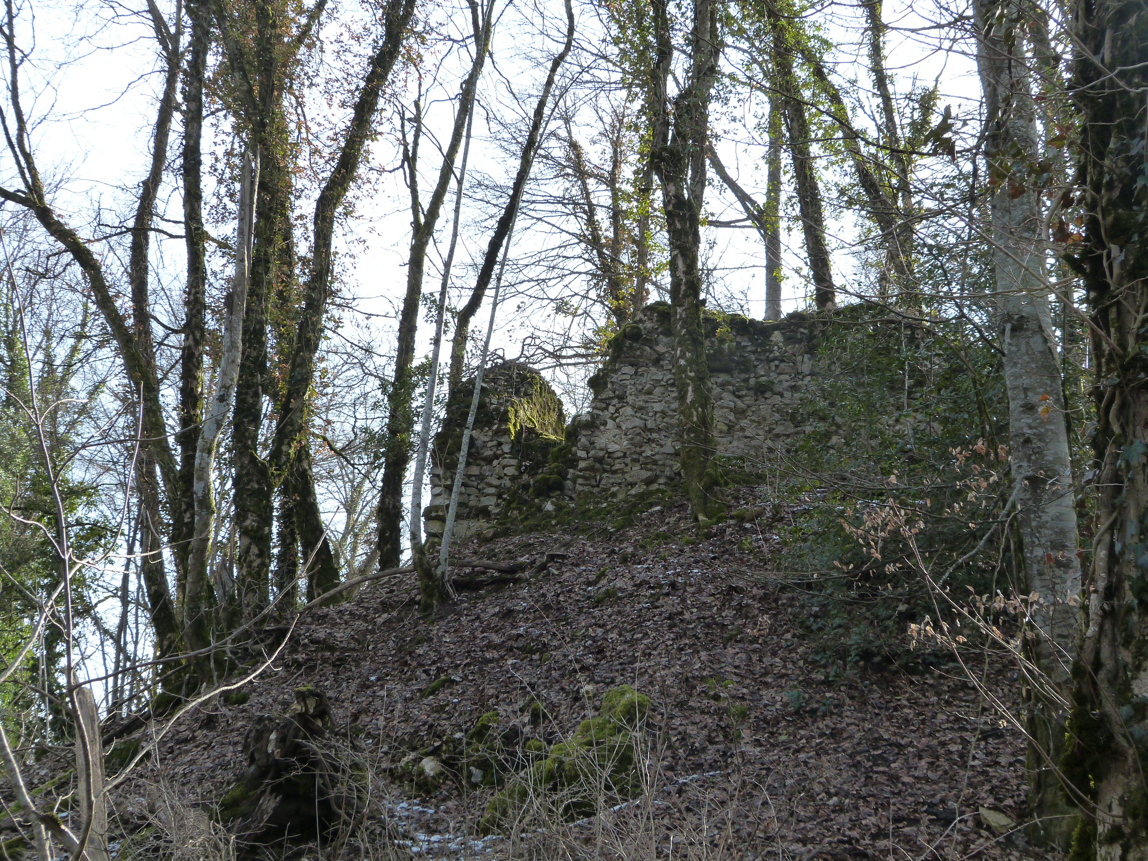 Ruines du Château de Rougemont